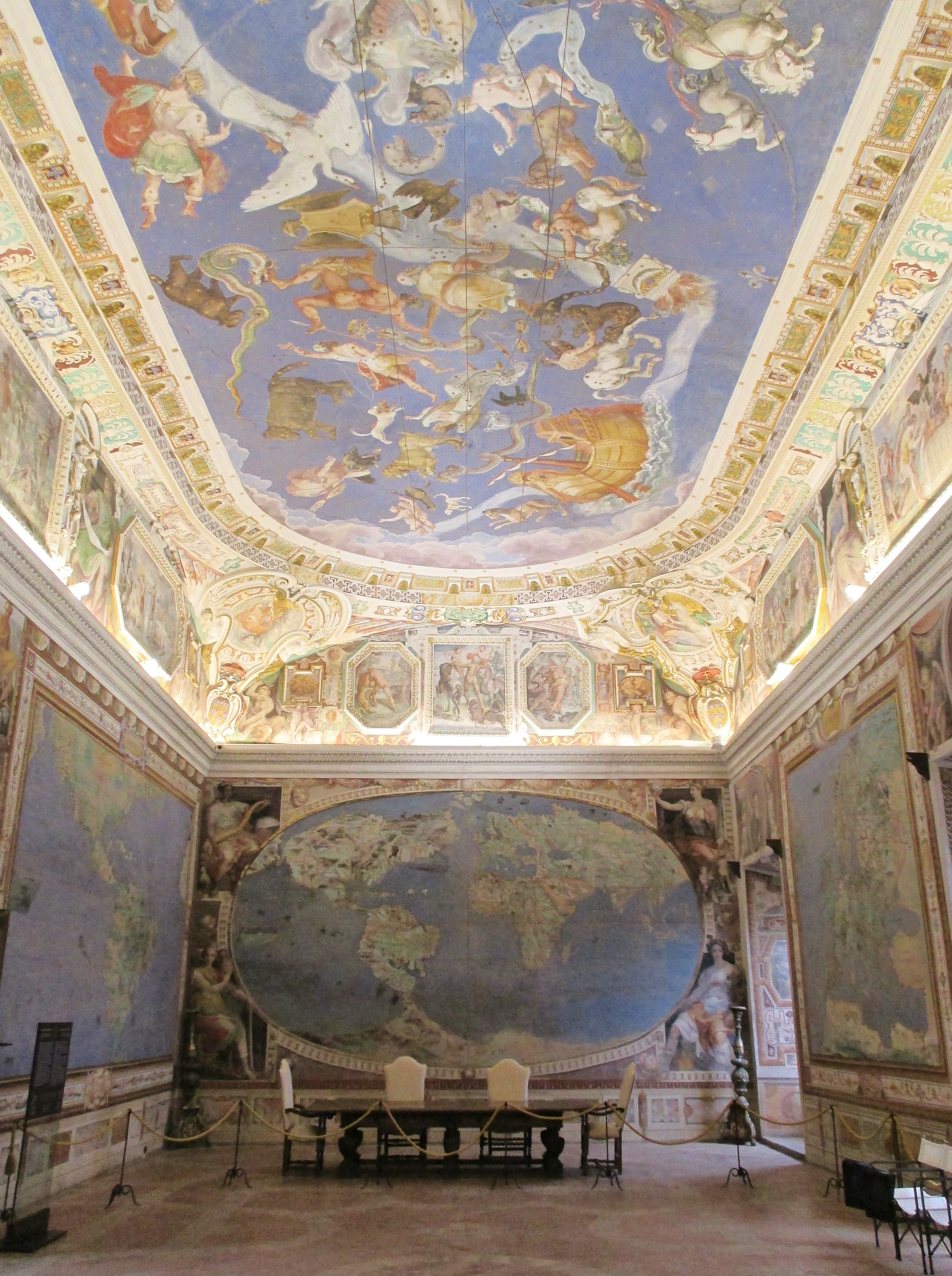 Caprarola, villa Farnese: sala del Mappamondo.